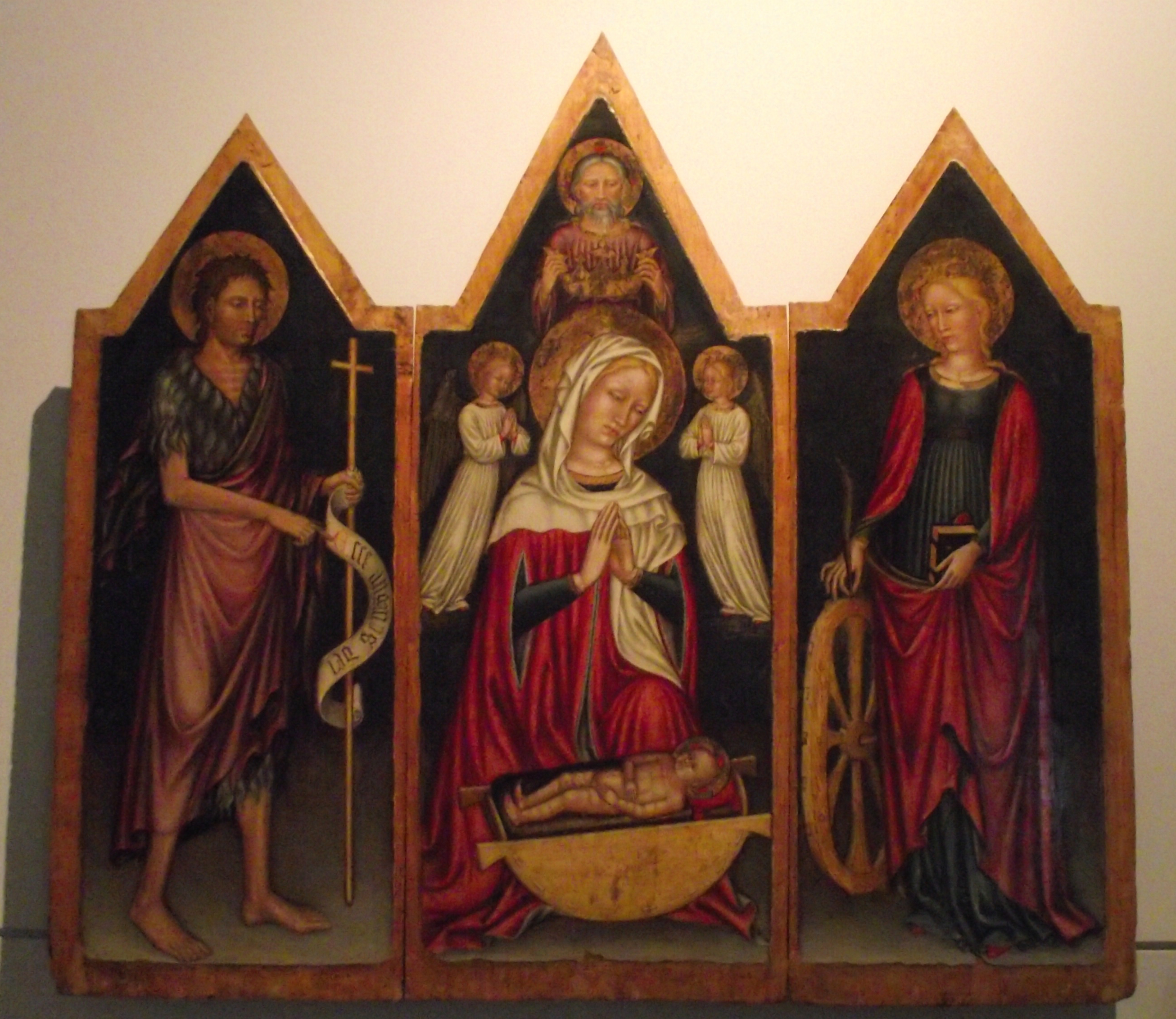 Fabriano, Pinacoteca Civica, Trittico della "Vergine adorante il Bambino, l'Eterno, S. Giovanni Battista, S. Caterina d'Alessandria", Maestro di Staffolo, metà XV secolo